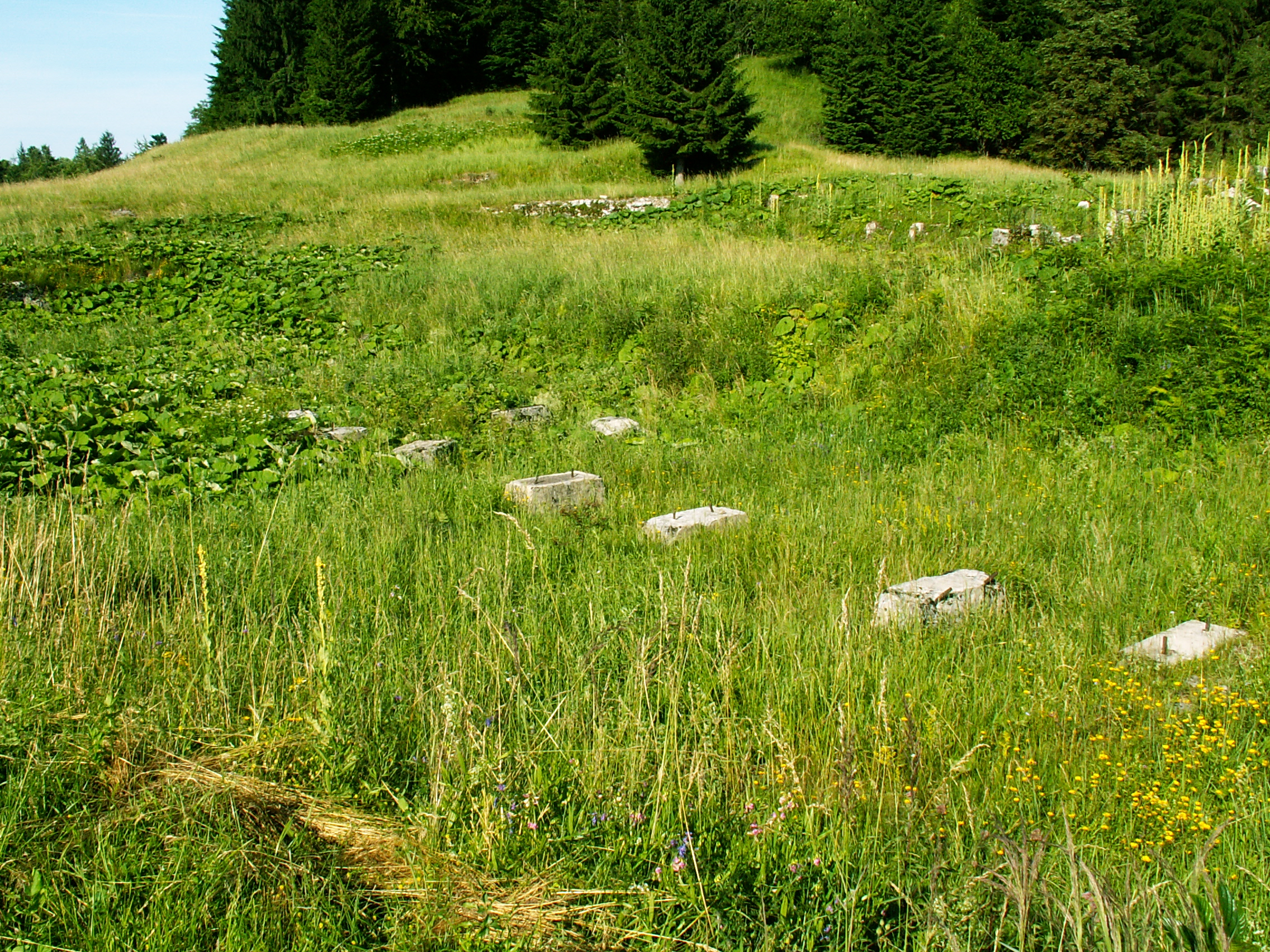 What is left of a sawmill Žaga Rog in Kočevski Rog, Slovenia. Trnovec, Kočevje.